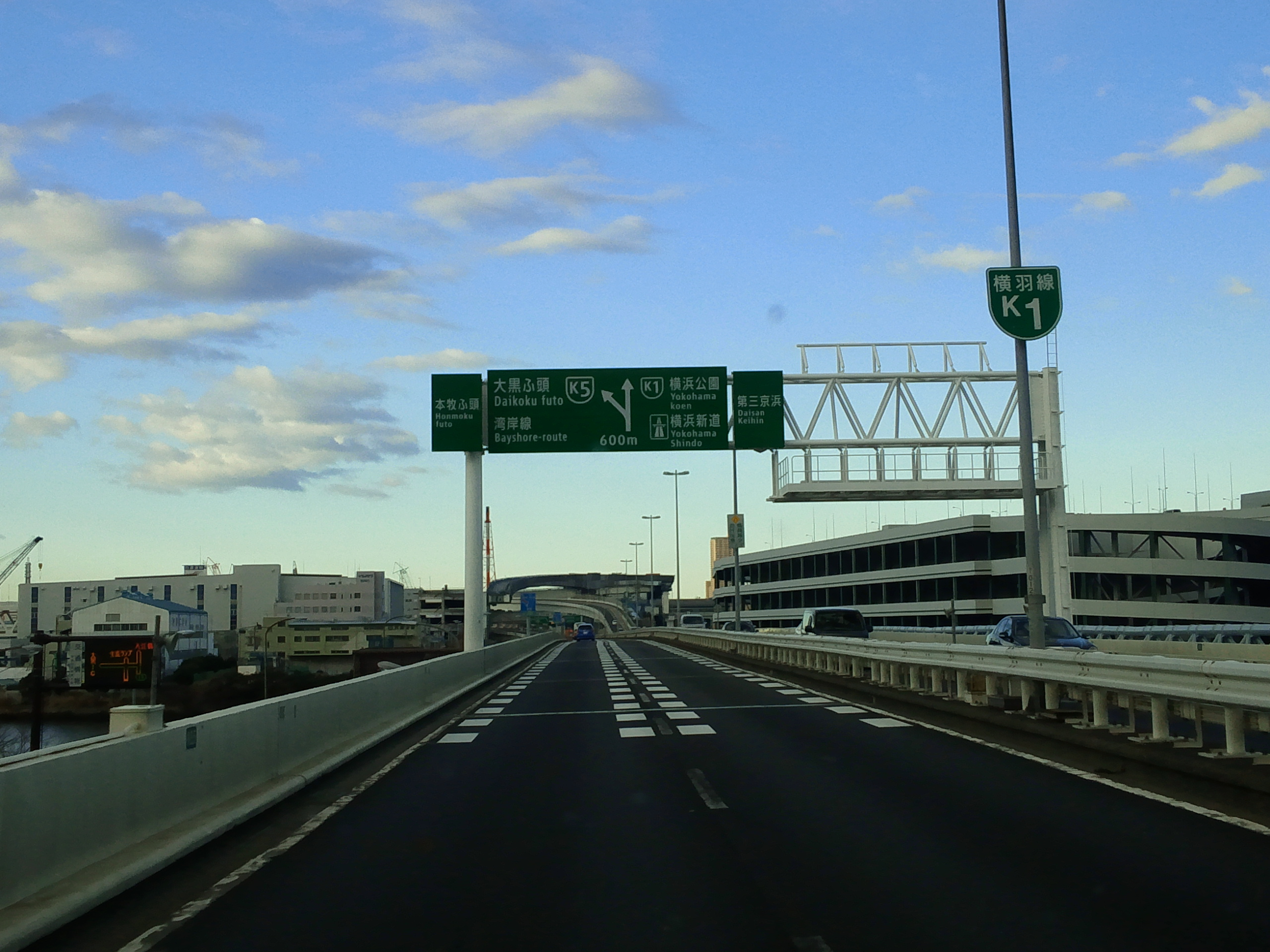 首都高速道路神奈川1号横羽線生麦JCT（金港JCT方面、600m手前付近）